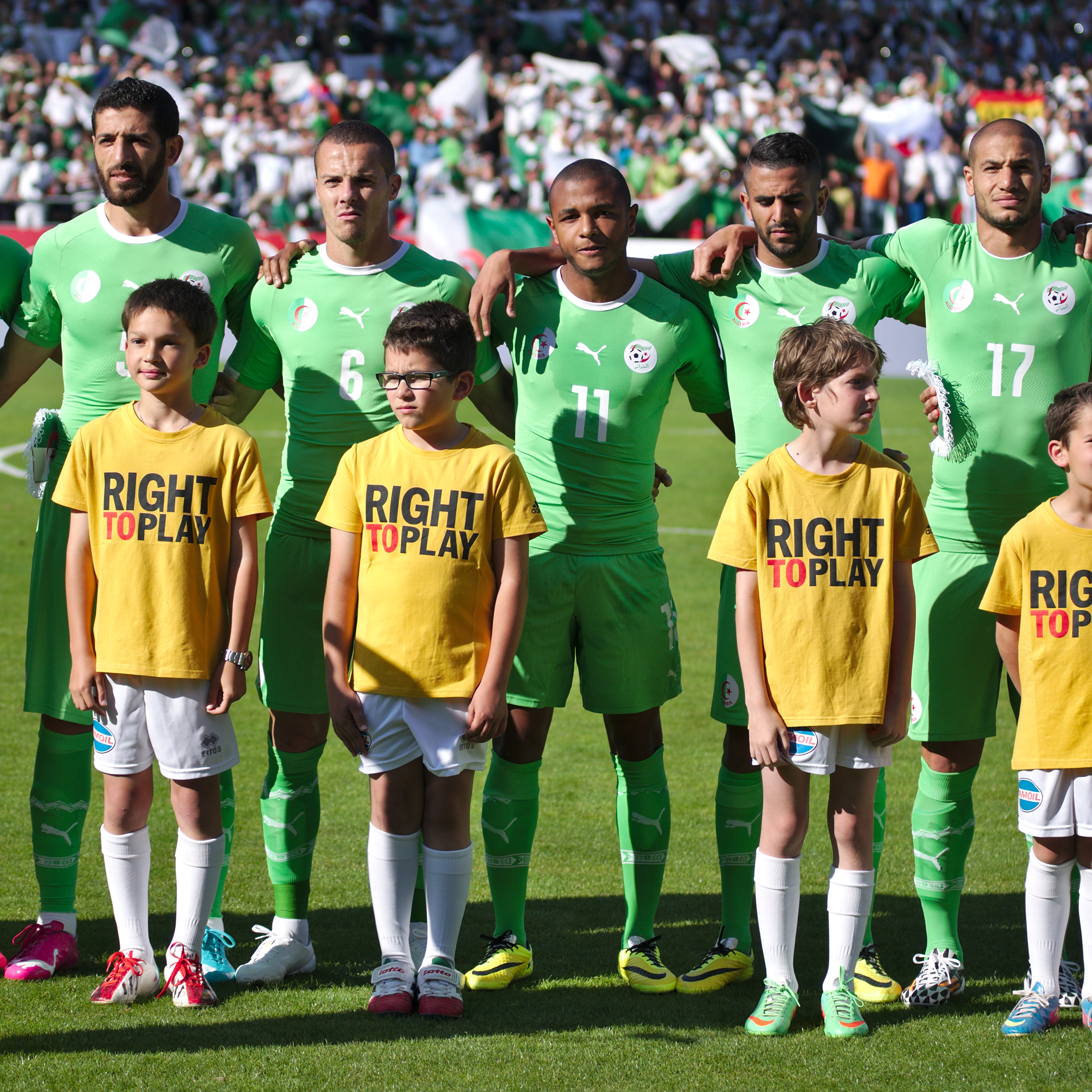 Algérie - Arménie - 20140531 - Rafik Halliche (5), Djamel Eddine Mesbah (6), Yacine Brahimi (11), Riyad Mahrez (21) et Adlan Guedioura (17)